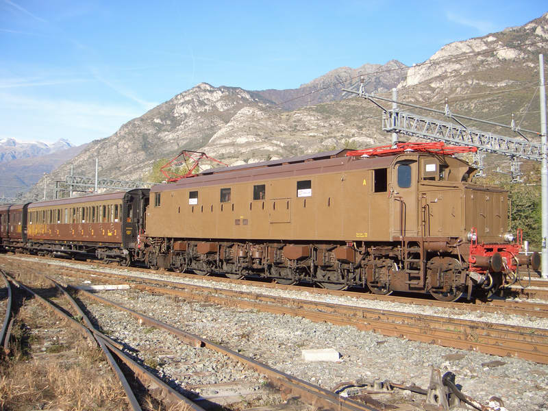 E.428.058 sul piazzale di Bussoleno pronto per treno speciale del 10.11.2006